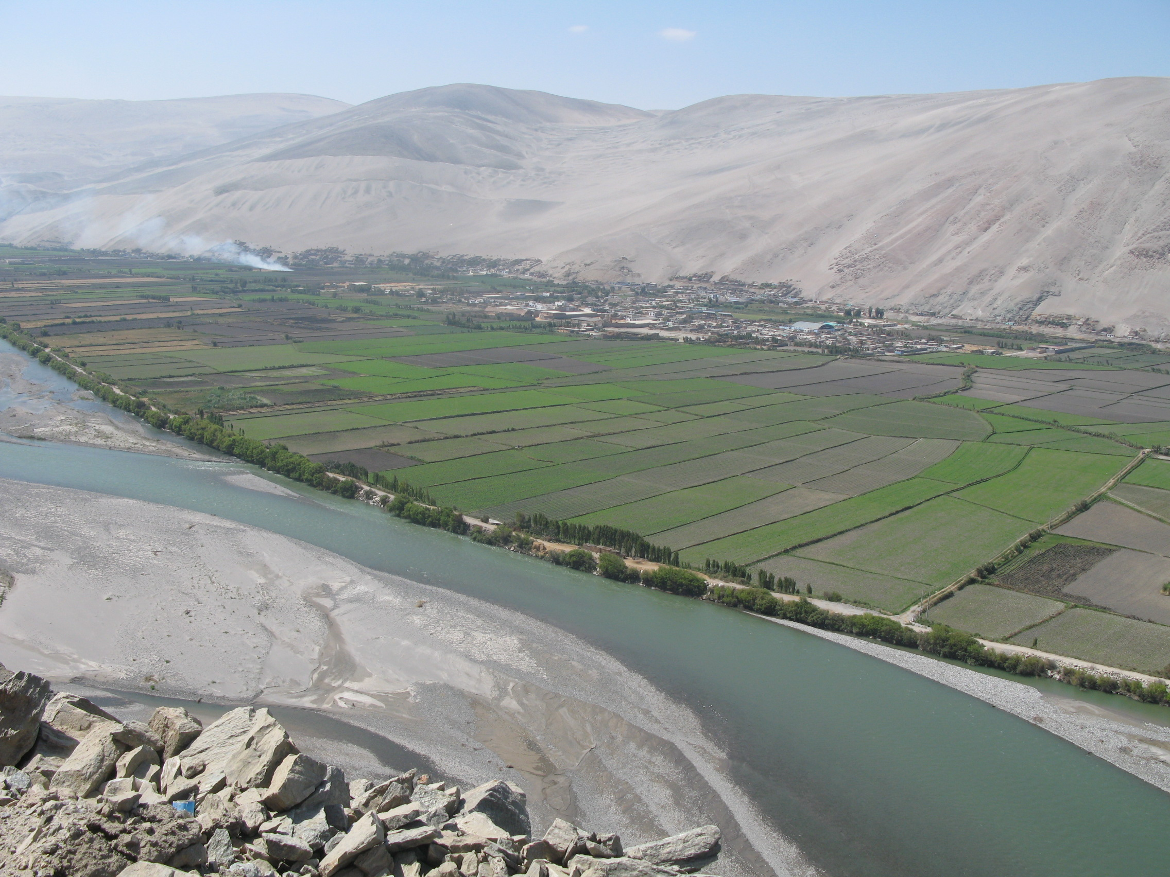 Zanimiva geologija in površje ob reki Ocoña